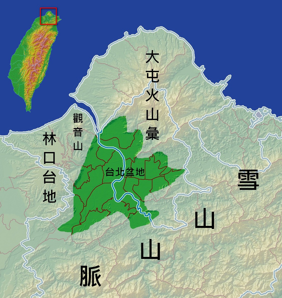 臺北盆地簡圖